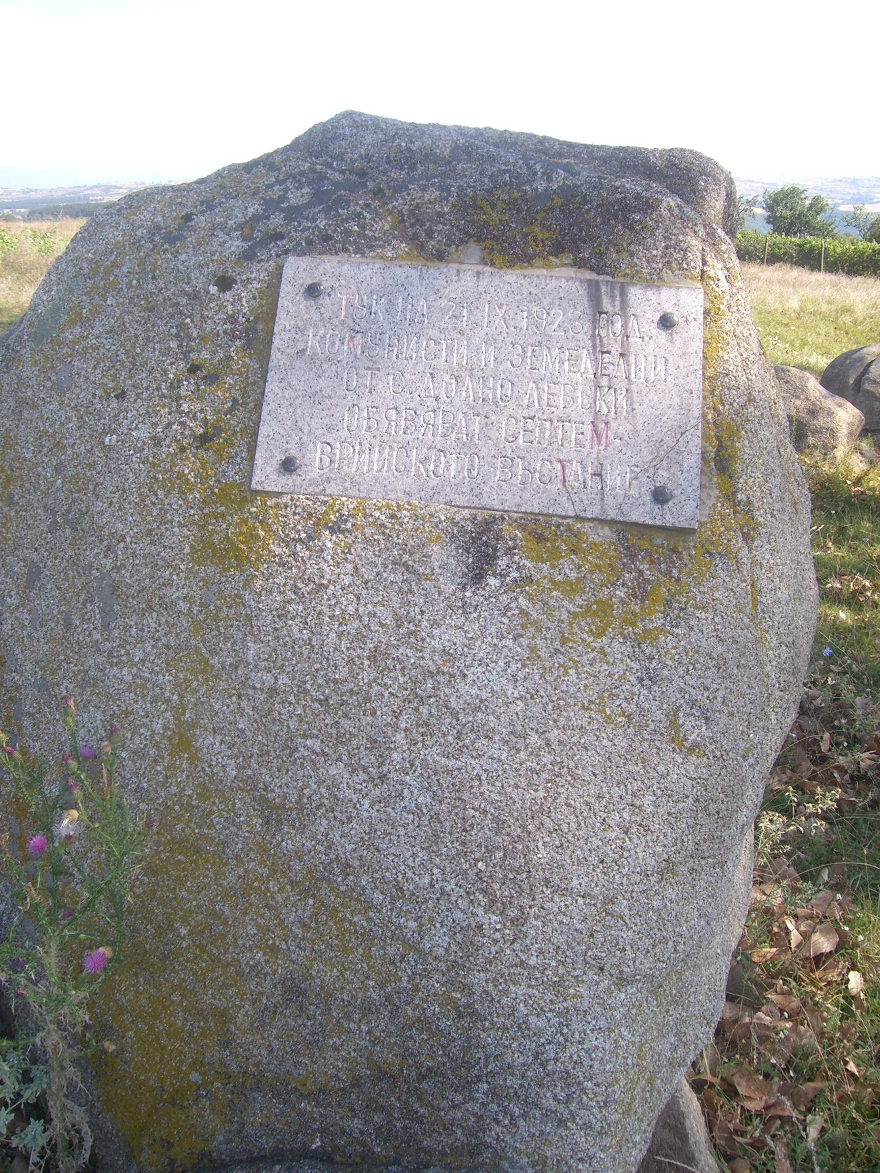 На това място през 1983 г. по случай тържественото чествуване на 60-годишнина от Септемврийското въстание бе поставена паметна плоча и възстановен някогашен кладенец.